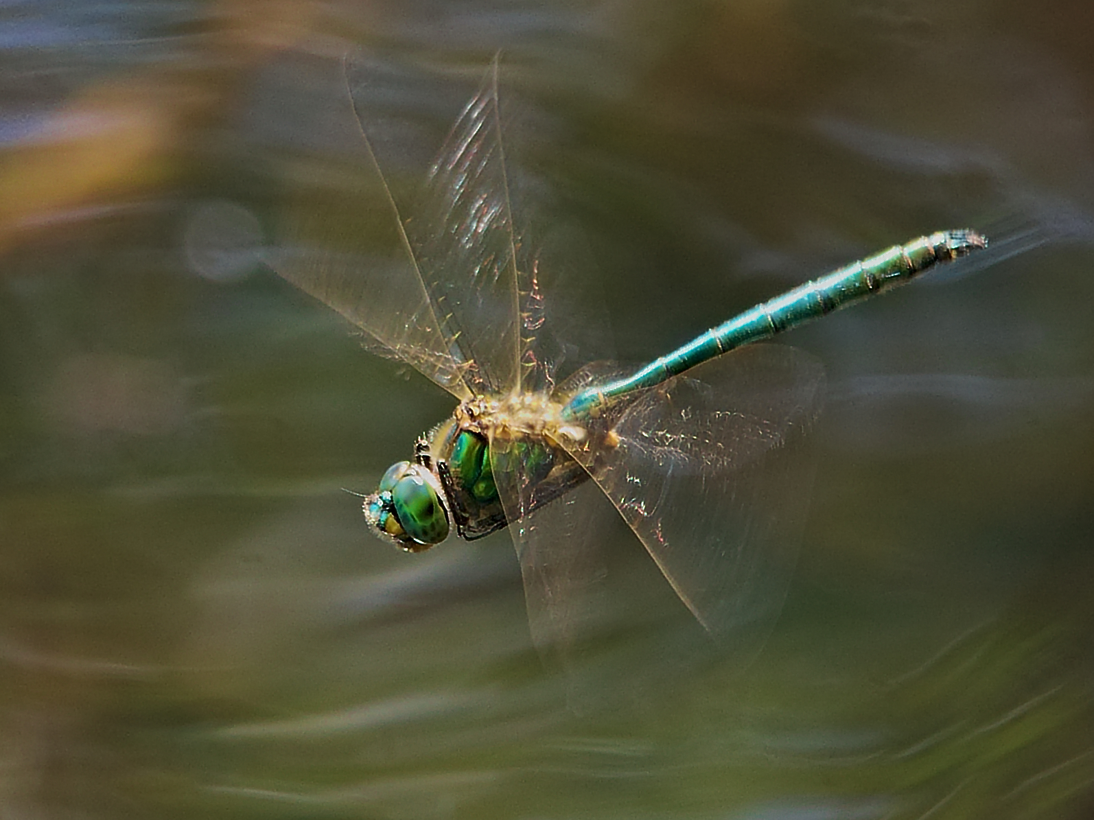 Glänzende Smaragdlibelle - Somatochlora metallica, Männchen im Flug. Aufgenommen bei Drosedow (Wustrow), Mecklenburg-Vorpommern, Deutschland.